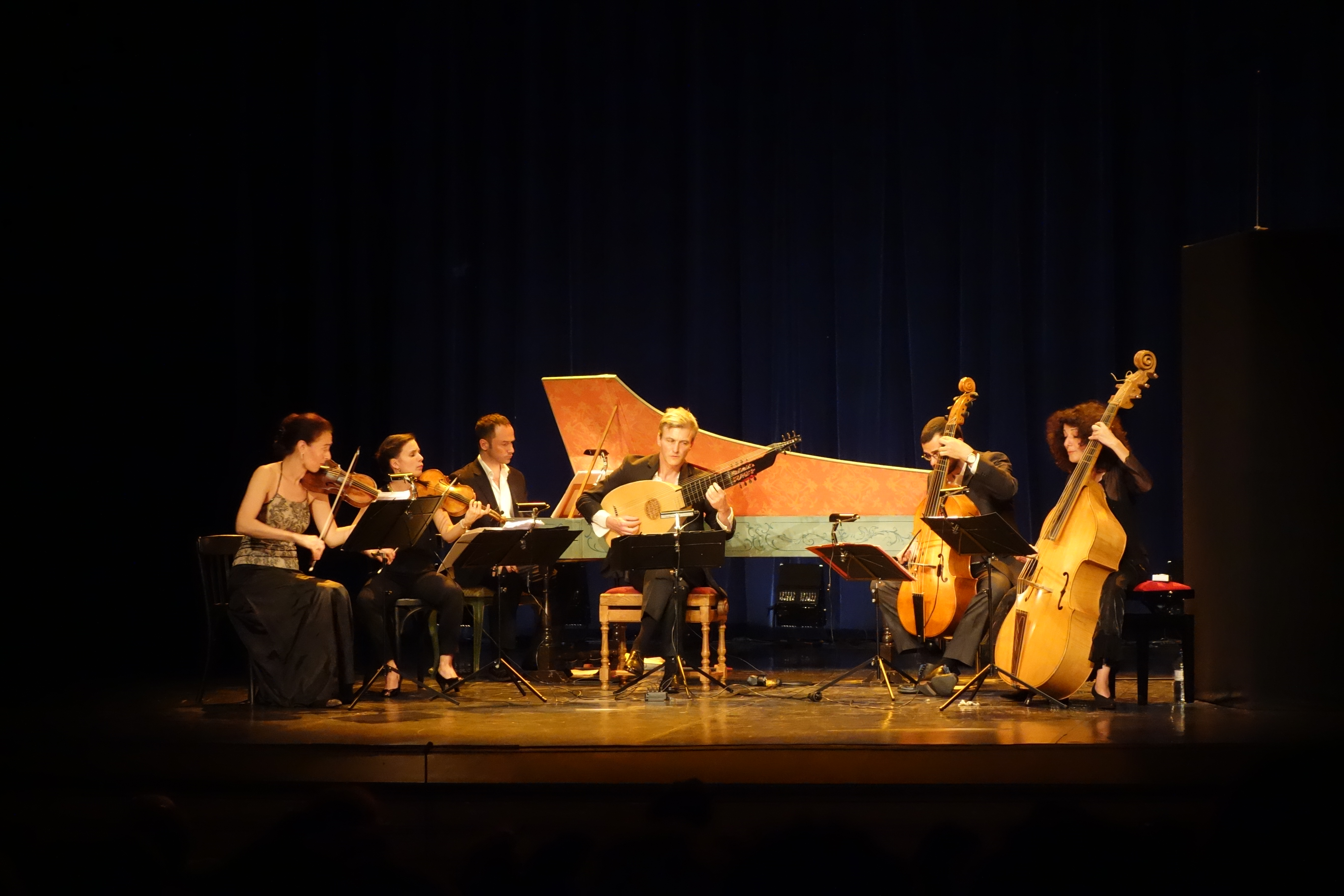 L'ensemble de musiciens « Le Poème harmonique » et son directeur artistique Vincent Dumestre (au centre) jouant une représentation de « La mécanique de la générale » dans le cadre du Festival de musique du Haut Jura au Théâtre de Lons-le-Saunier